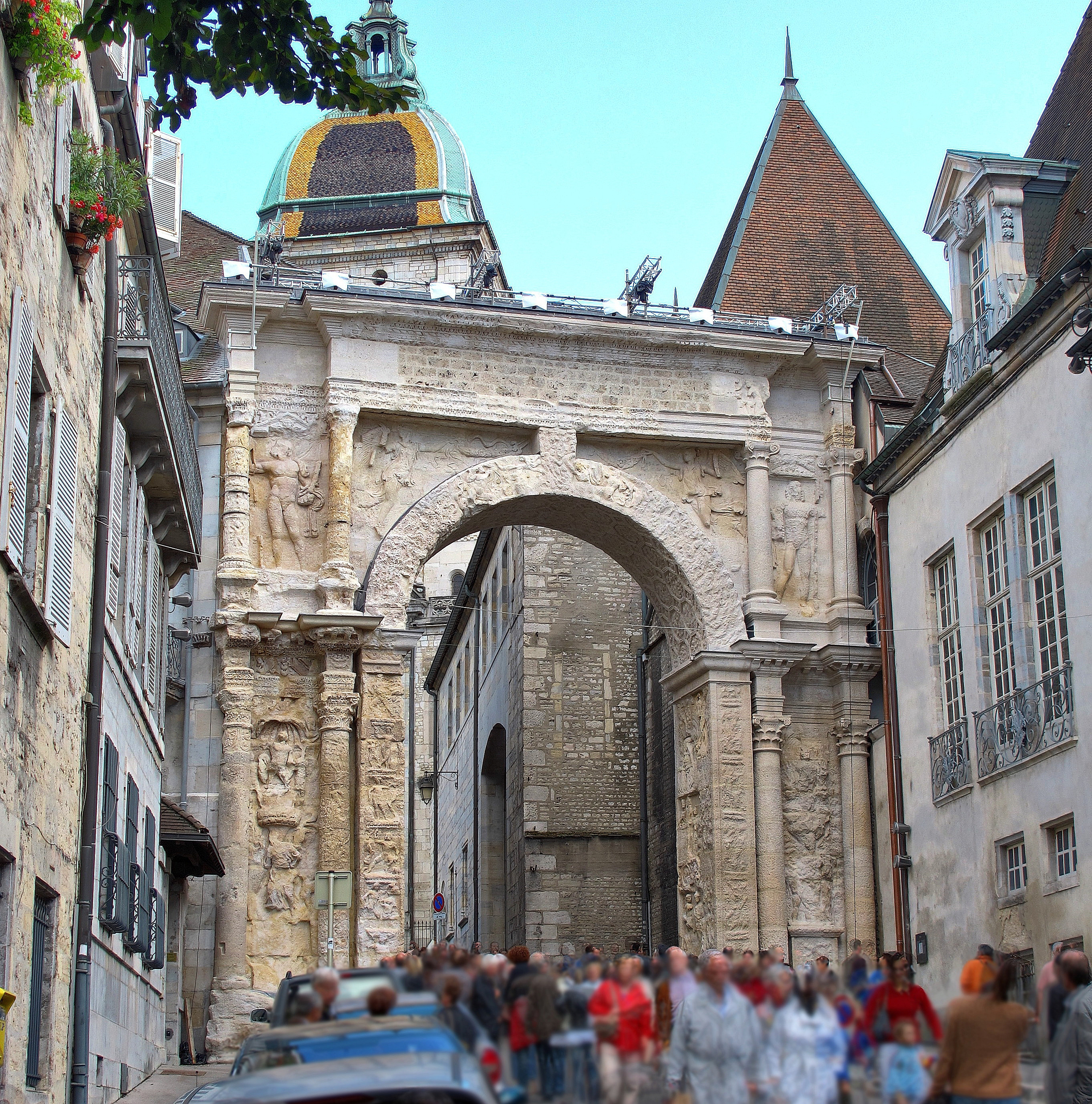 La Porte Noire, arc de triomphe de Besançon .